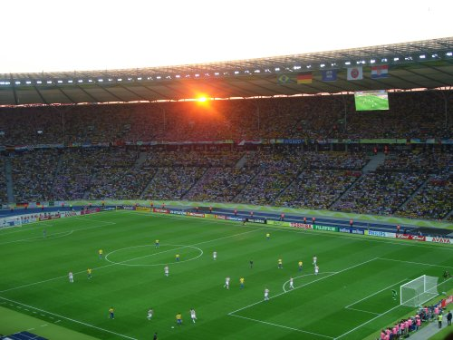 21:13, o sol se pondo em Berlim, Brasil e Croácia em campo, por enquanto 0 a 0...Brazil x Croatia - Berlin, Olympiastadion